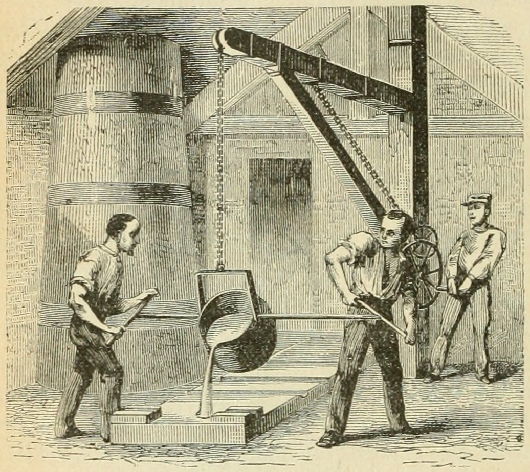 Ouvriers coulant la fonte dans un moule.